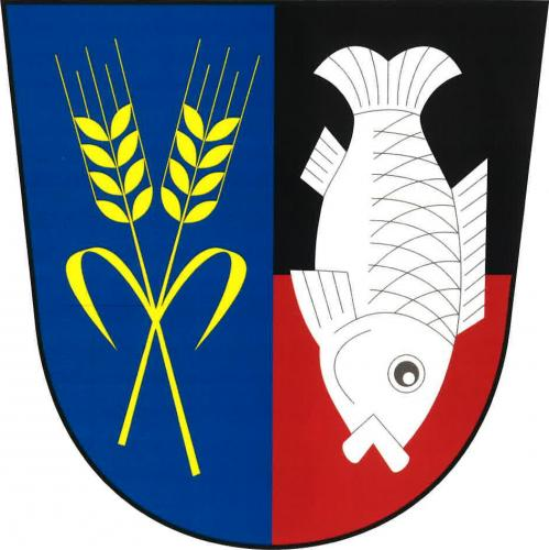 znak, Bousov, okres Chrudim